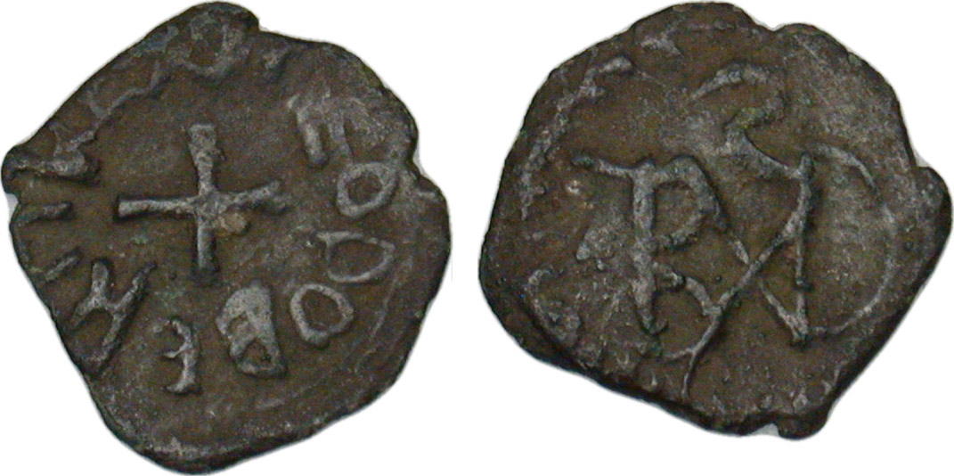 Date : n.d. Métal : cuivre Diamètre : 16,5mm Axe des coins : 6h. Poids : 1,24g. Degré de rareté : R2 Titulature avers : [T]EODOBERTI REX. Description avers : Croix. Traduction avers : (Théodebert, roi). Description revers : Monogramme formé des lettres BXDS dans une guirlande. Commentaire Les monnaies de cuivre de l’époque mérovingiennes sont rares et leur dénomination n’est pas connue. La signification du monogramme du revers n’est pas déterminée.